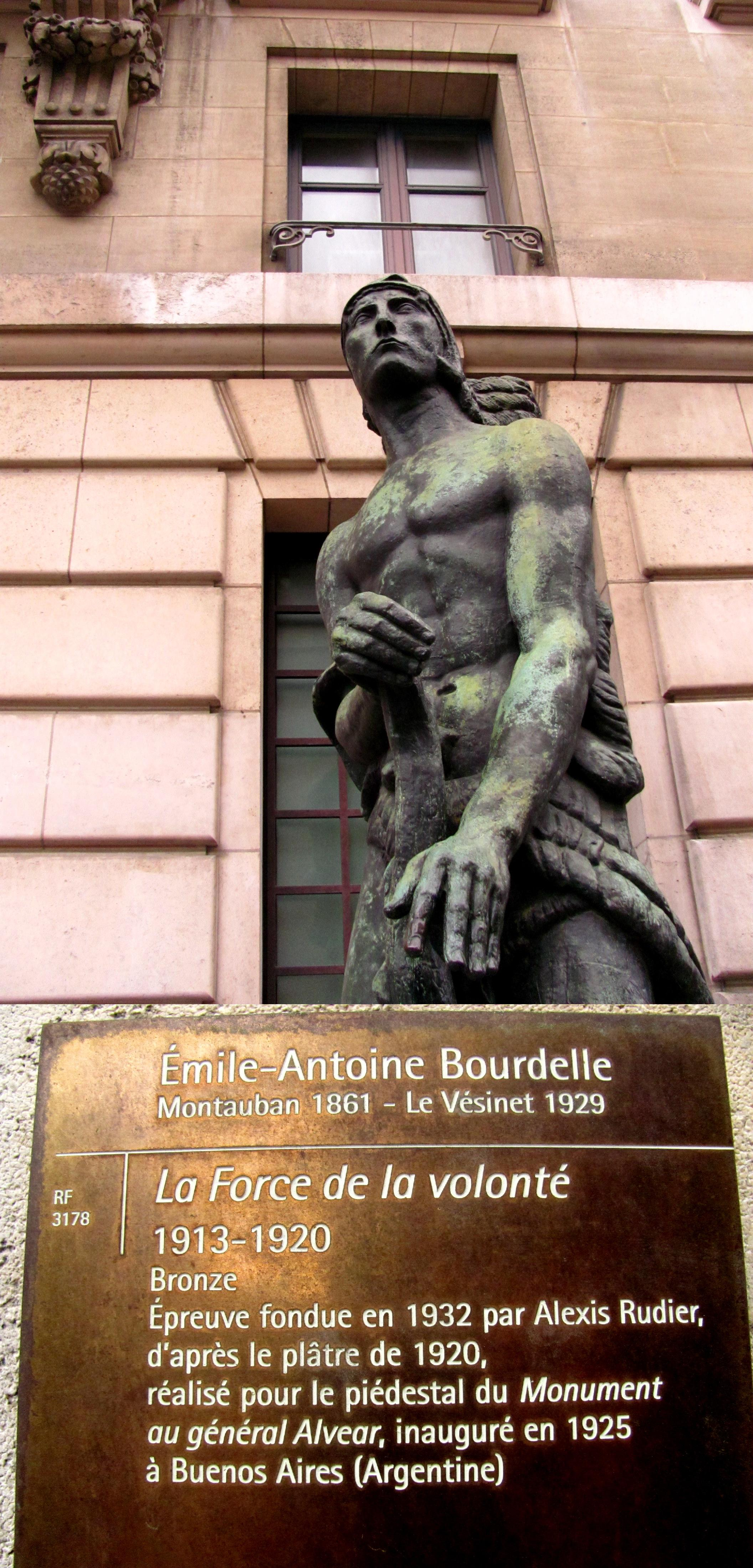 Émile-Antoine Bourdelle, sculpture en bronze, musée du Quai d'Orsay, Paris